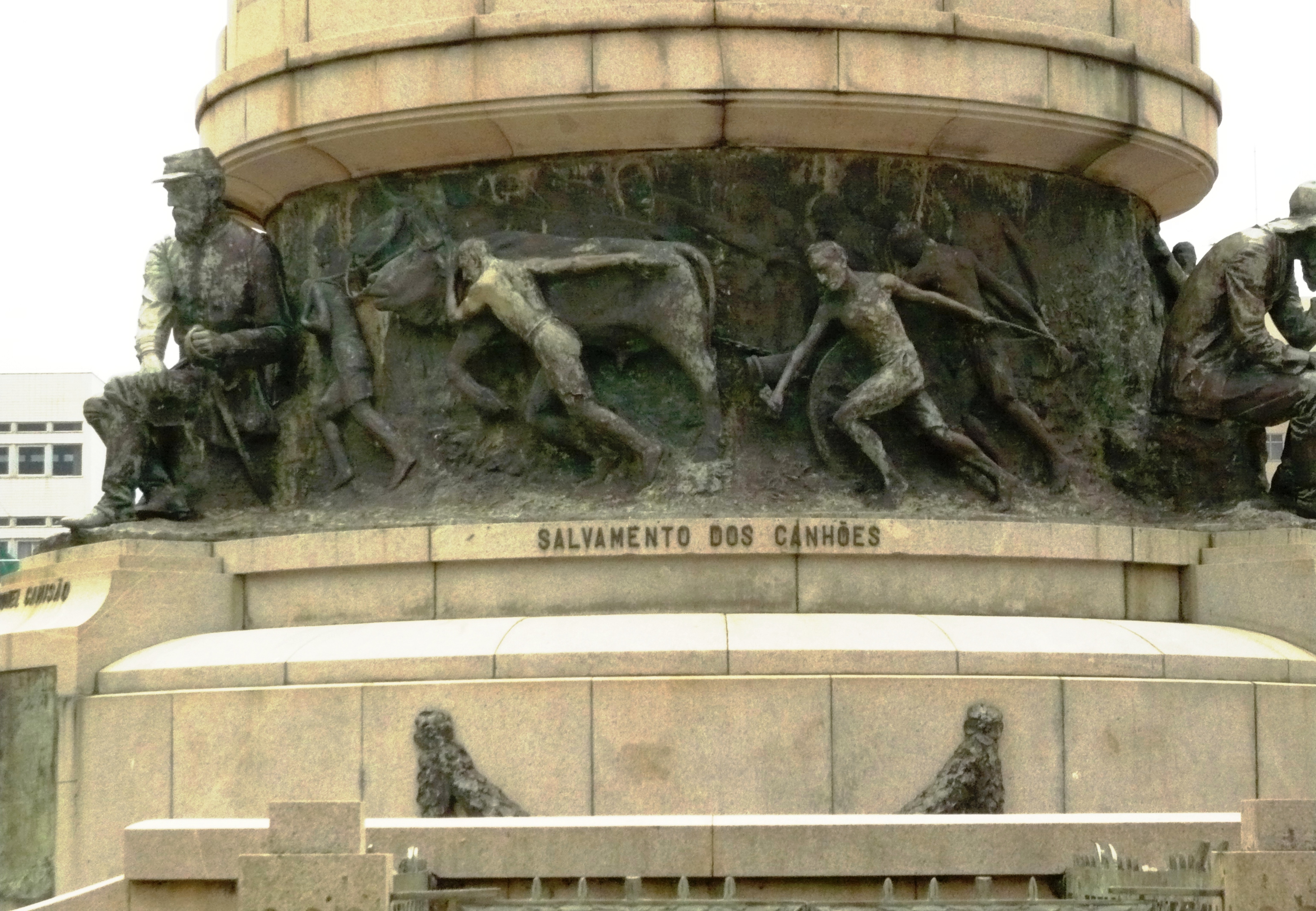 Monumento aos Heróis de Laguna e Dourados, Urca, Rio de Janeiro, RJ, Brasil: detalhe do salvamento dos canhões.